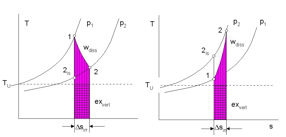 Zustandsänderung in adiabaten Maschinen.jpg